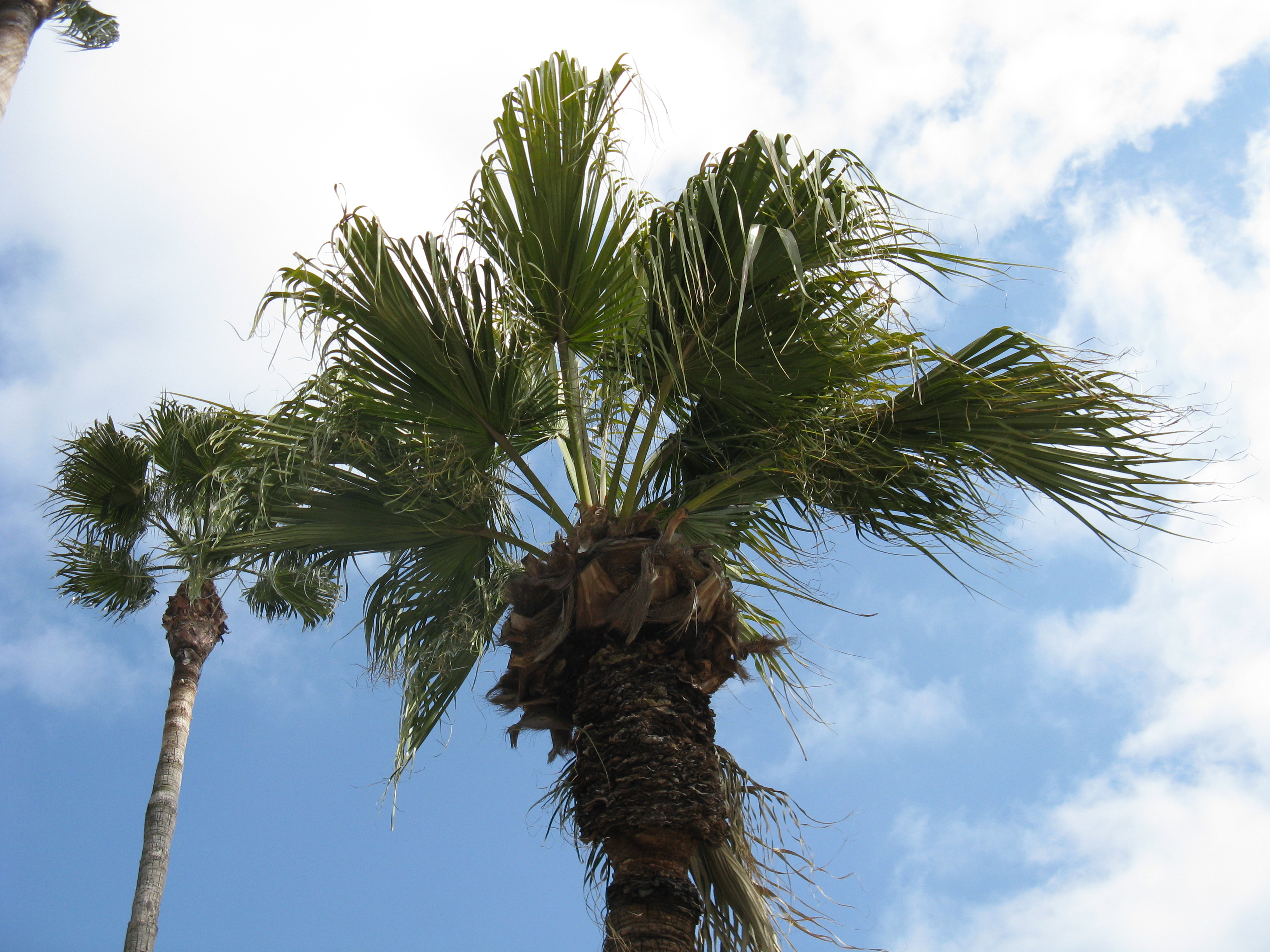 Livistona chinensis var. subglobosa